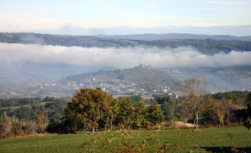 Le château de Calmont d’Olt dominant Espalion (invisible en arrière-plan) - au fond, les monts d’Aubrac - vue depuis la D920 [11.2004] Photo: Jean-Paul Cronimus Matériel: Canon EOS 300D Date: 2.11.2004 - heure de midi Temps semi-couvert, heure de midi Format original après recadrage : 3070 x 1870 Licence: GFDL